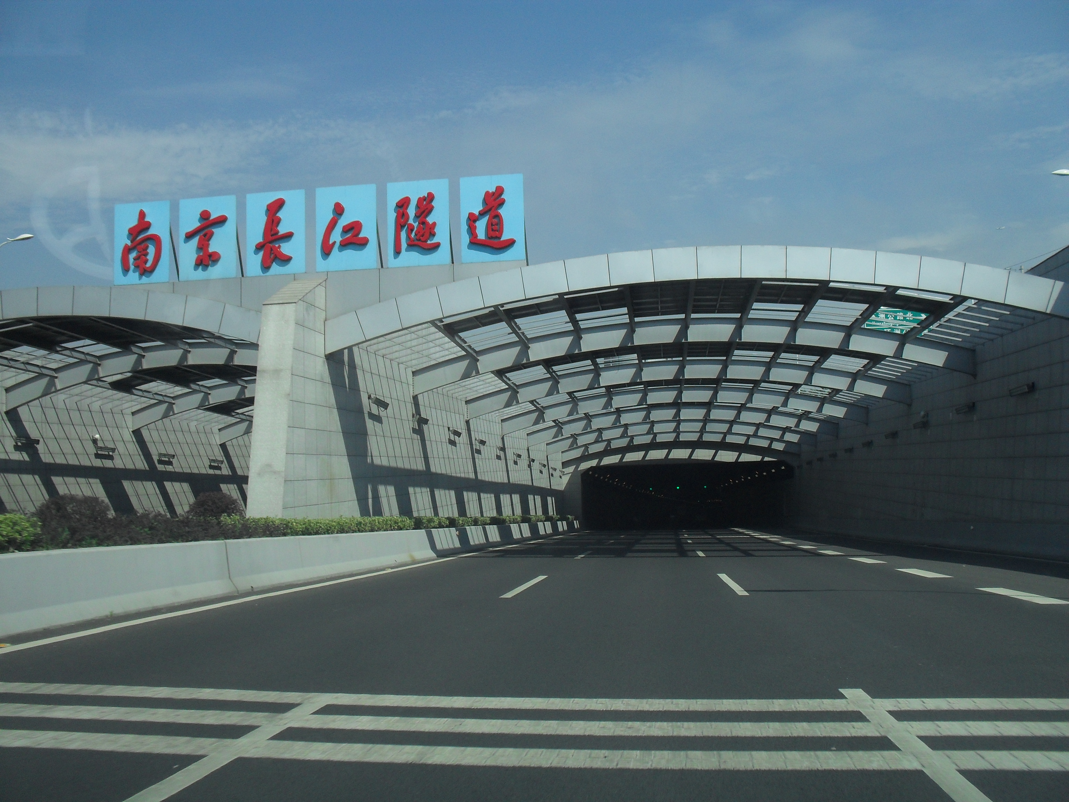 南京江心洲长江隧道